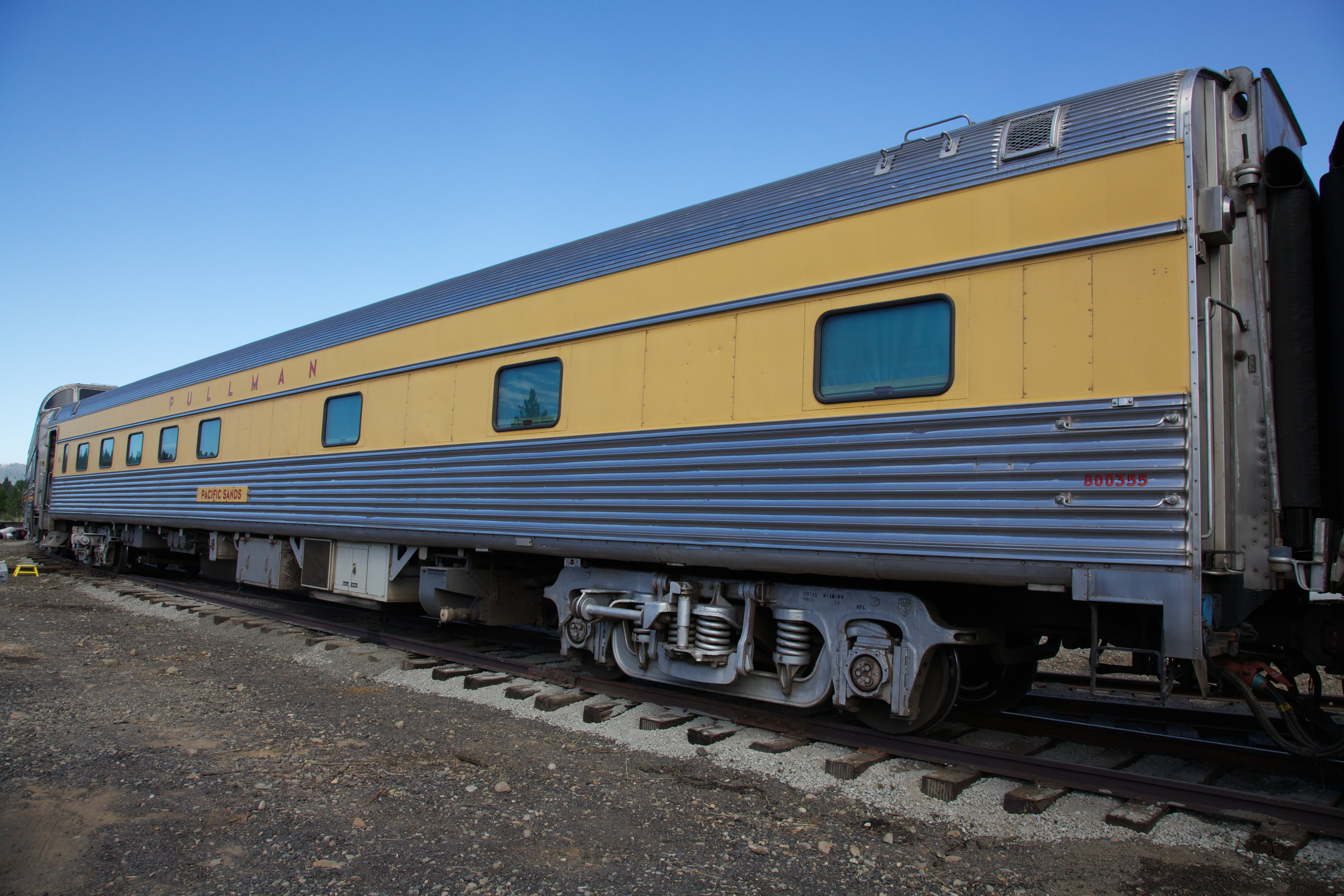 Pacific Sands Pullman Sleeper